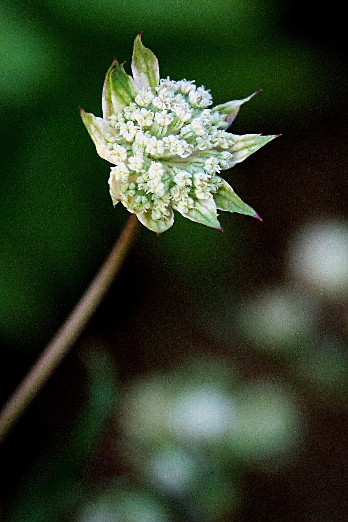 Ísland, Akureyri Botanical Gardens: Kleine_Sterndolde: Astrantia_minor